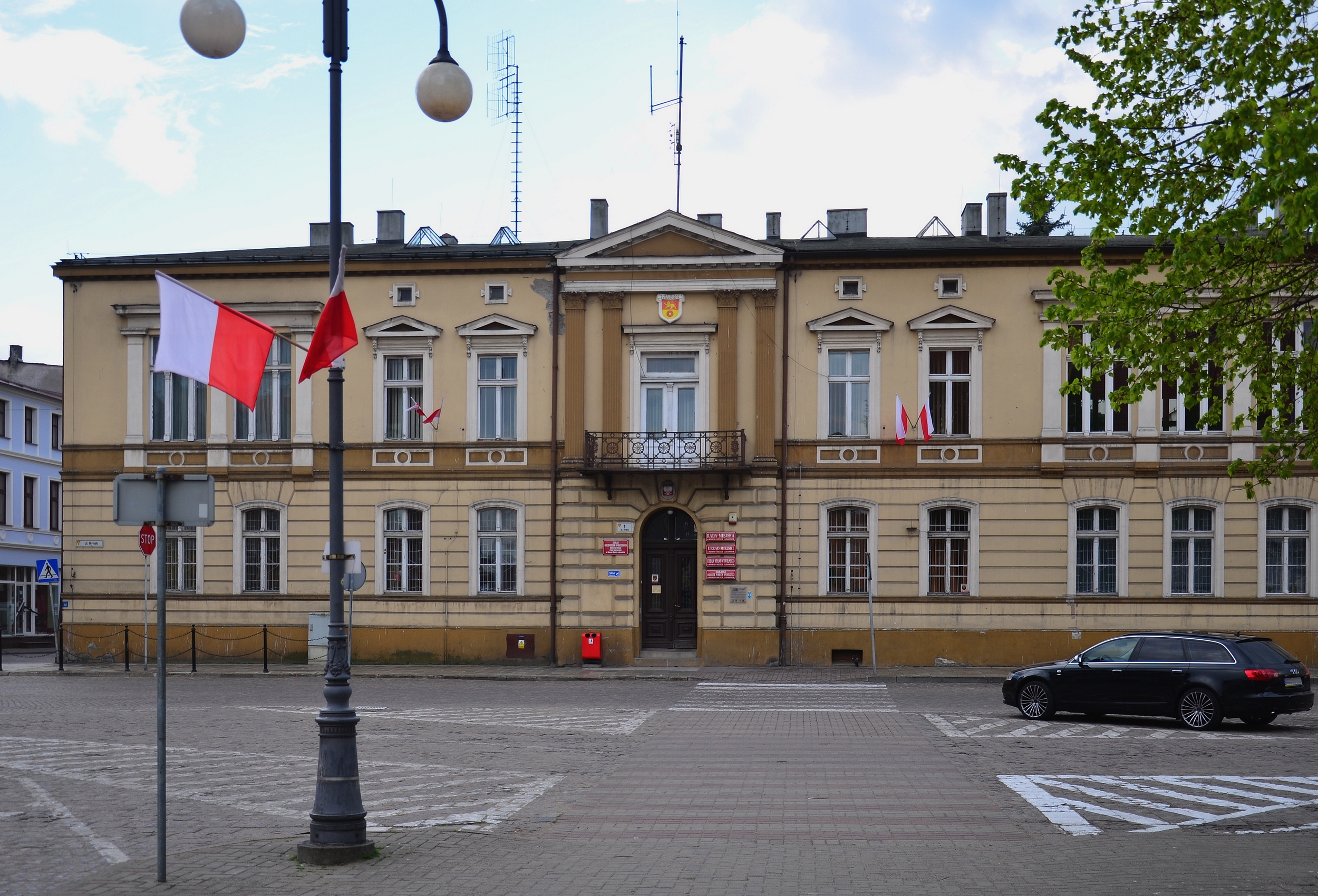 Rynek 1, gmach Urzędu Miasta, 1776-1777